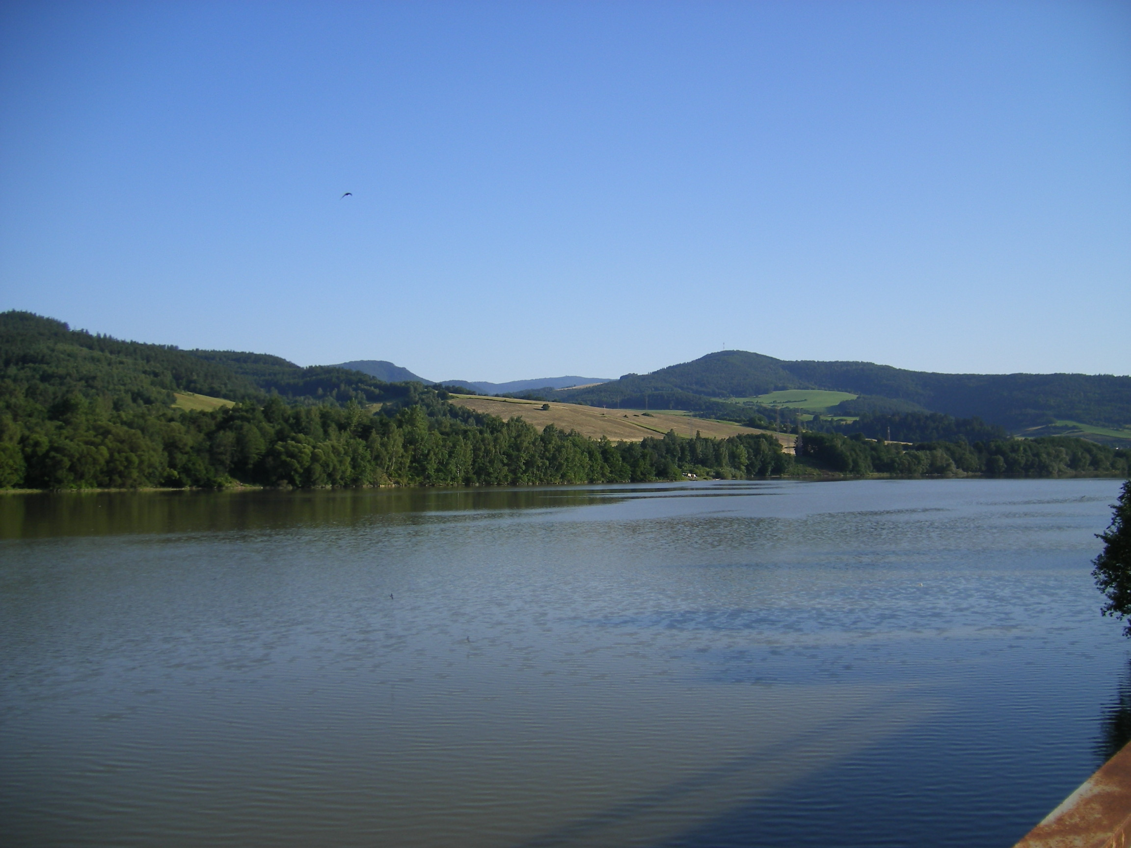 Margecany (okres Gelnica) reservoir